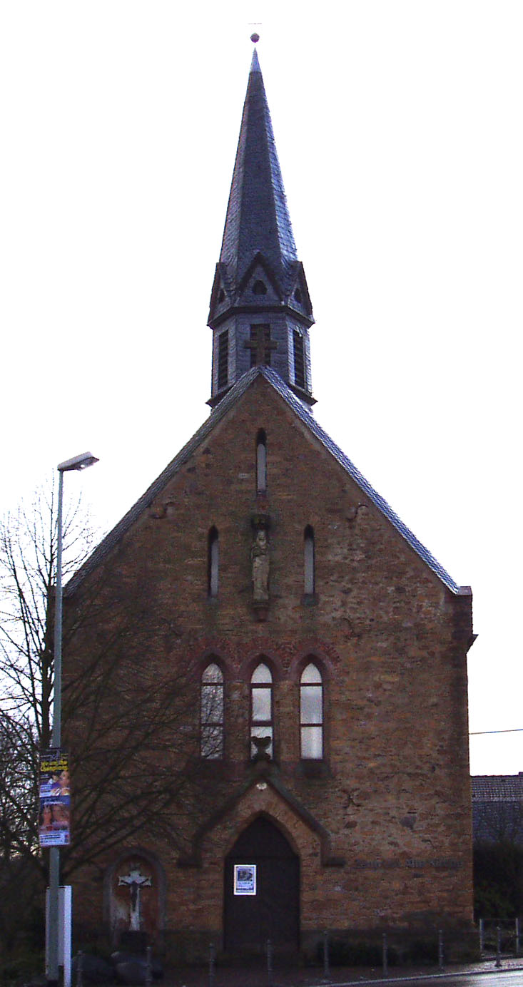 Alte katholische Kirche in Niedernhausen im Taunus, heute als Kulturzentrum genutzt.